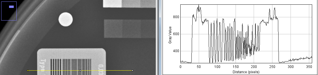 Medida del perfil de rayas con ImageJ